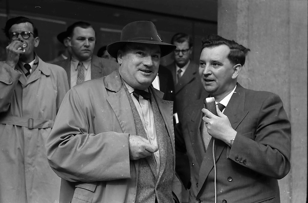 Bildhauer Röselmeier beim Rundfunkinterview